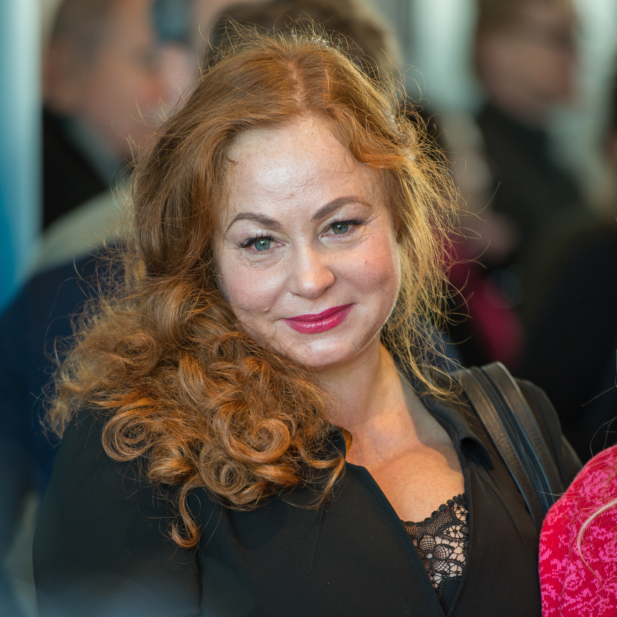 BR,Bayerischer Rundfunk,Bayerisches Fernsehen,Filmbrunch 2017,Petra Berndt